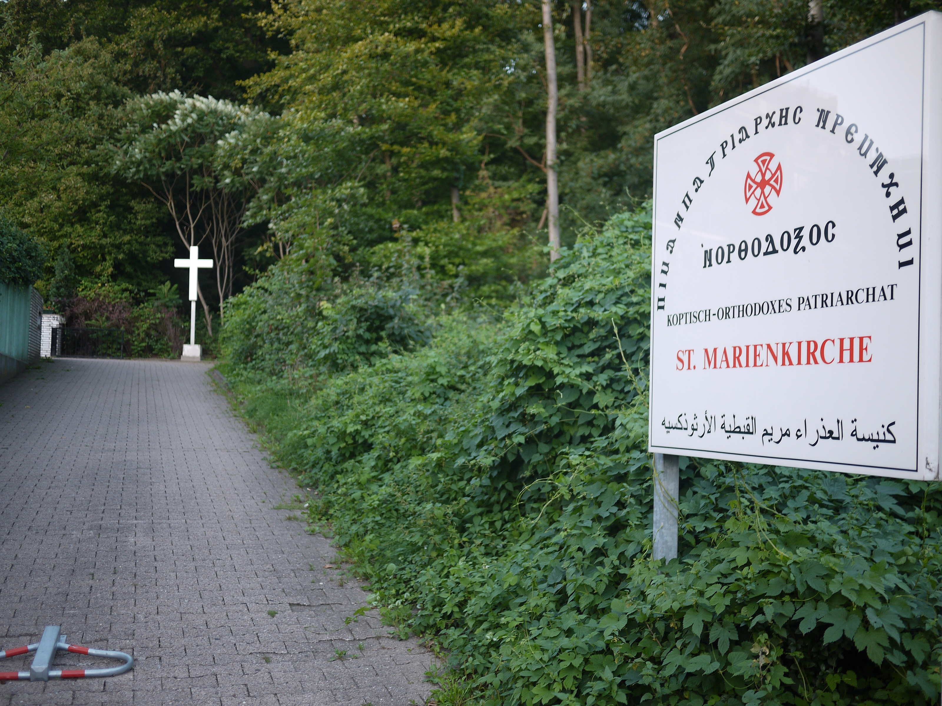 Koptisch-orthodoxe Kirche Düsseldorf, Deutschland